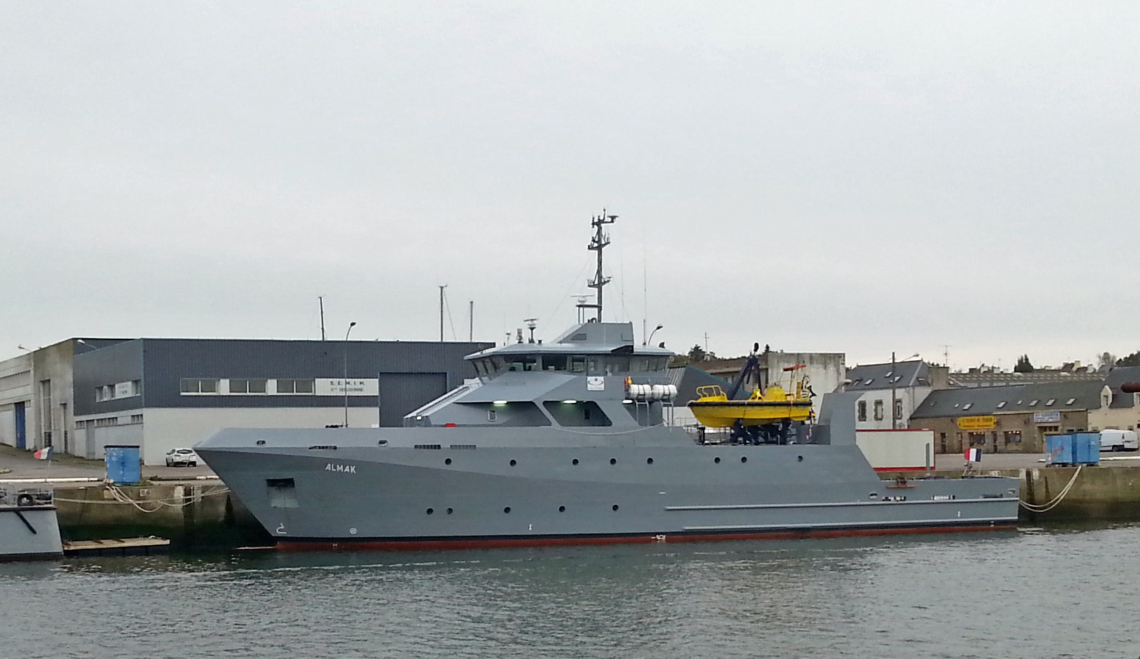 Le BFM (bâtiment de formation de la Marine) Almak en cours de construction à quai à Concarneau.